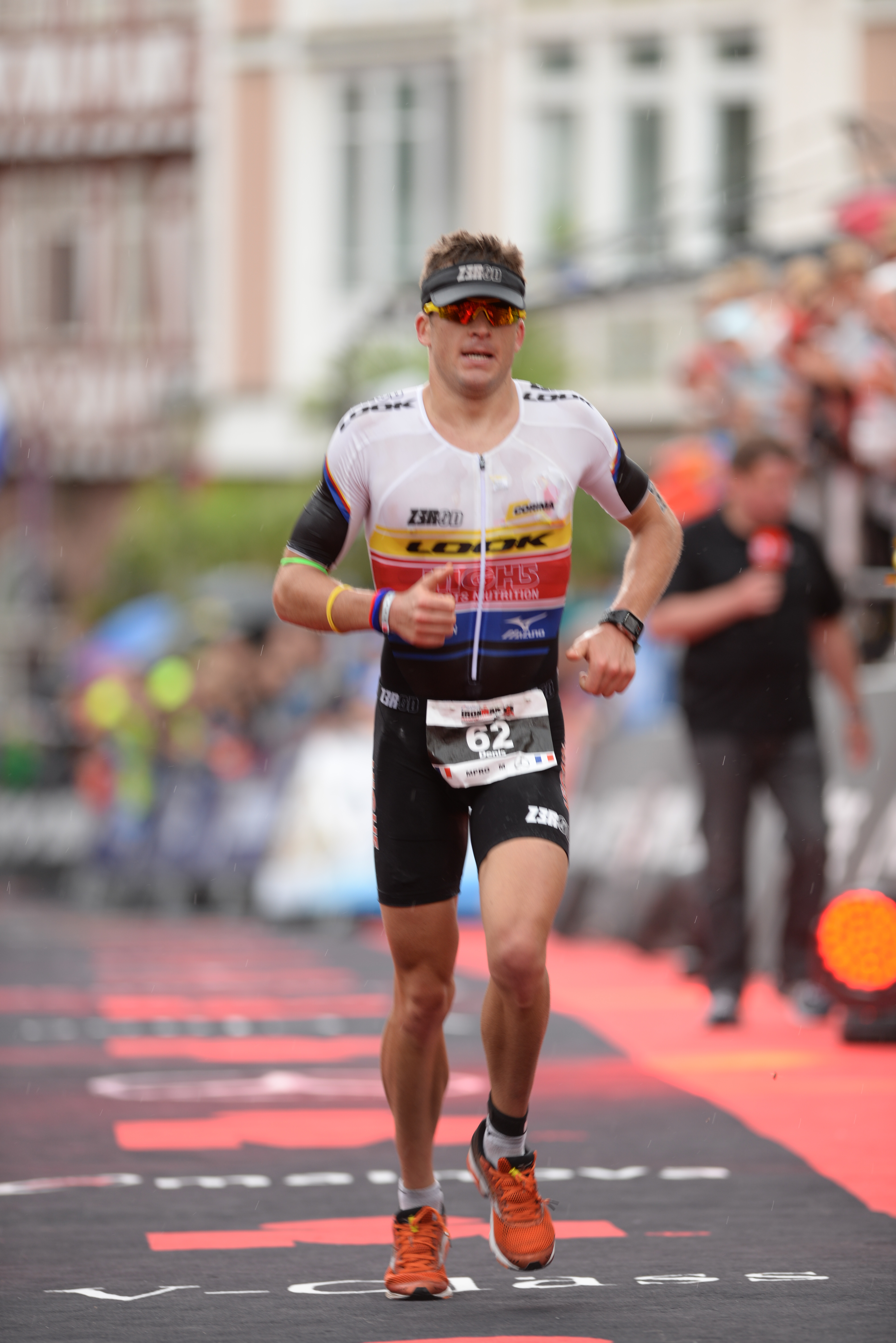 Ironman 2016, Starterlisten unter